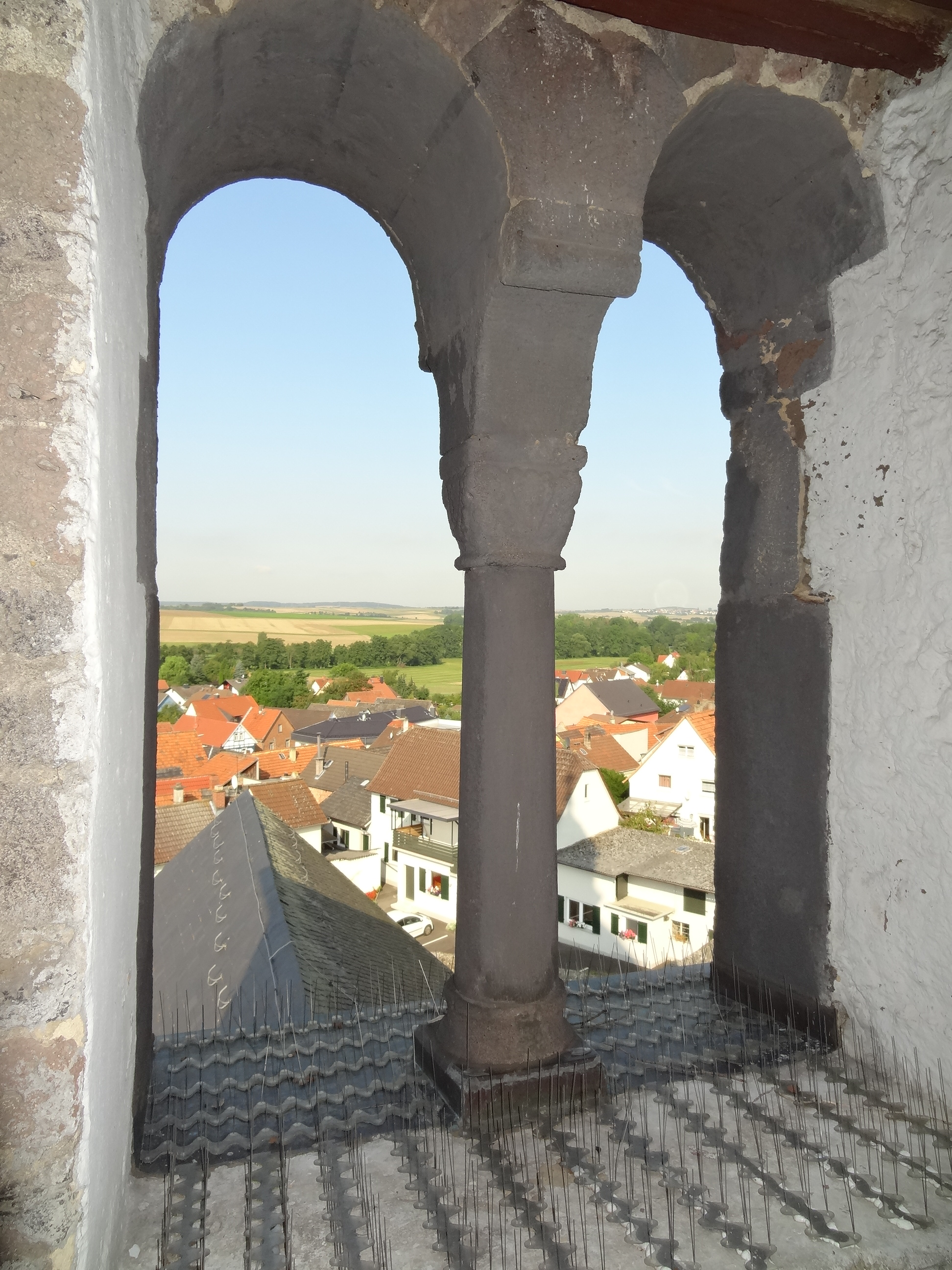 Evangelische Kirche Muschenheim